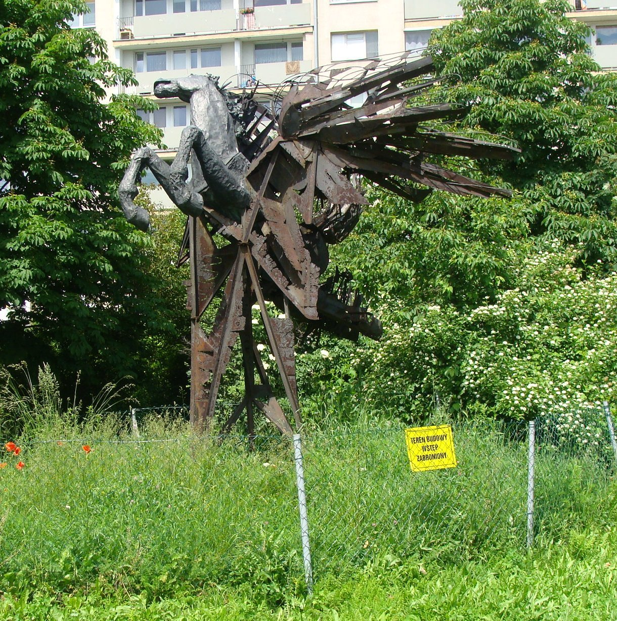 Pegaz na ul. Chabrów w Opolu. Rzeźba autorstwa Mariana Nowaka